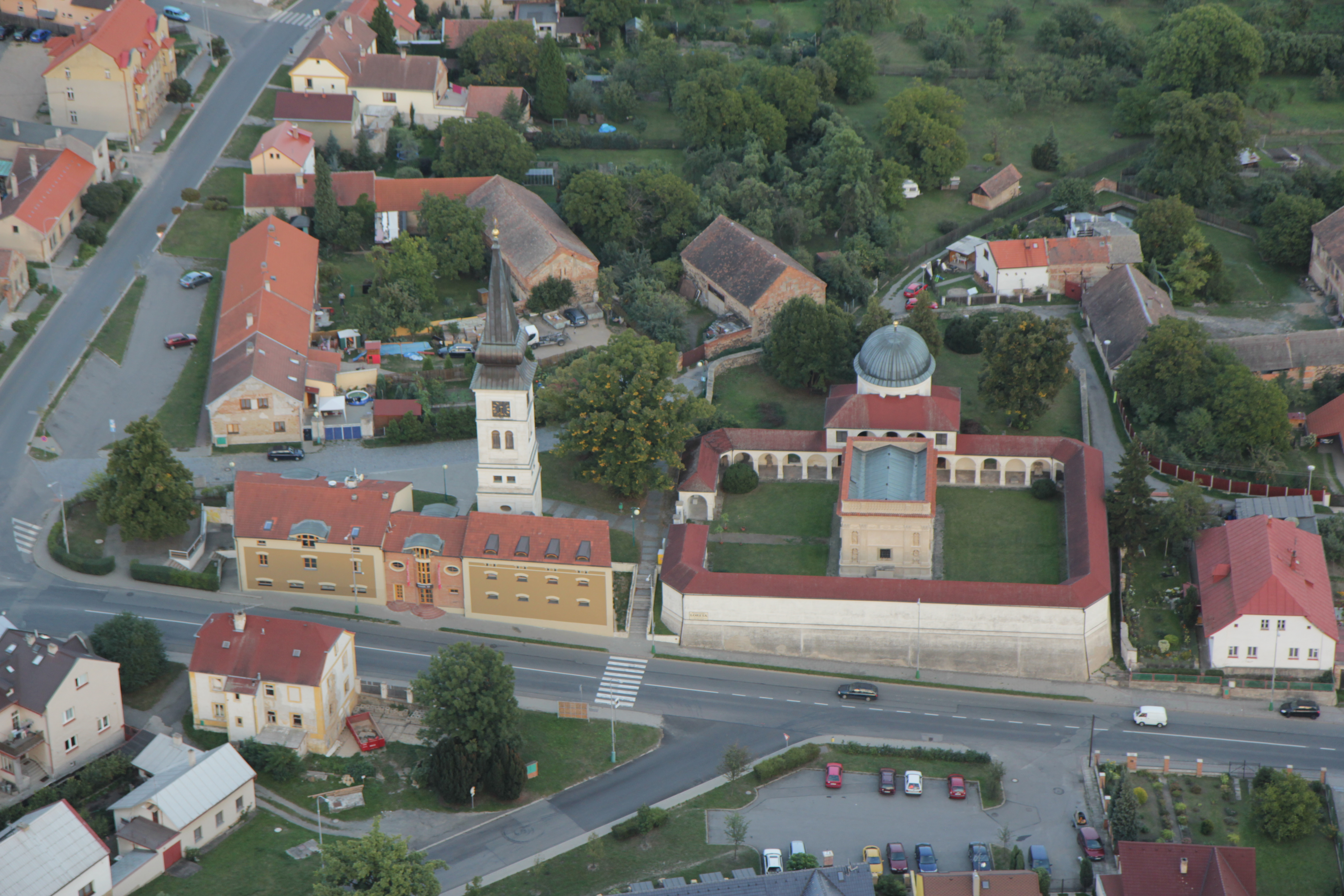 Loreta Sta. Casa (Kosmonosy), V. Kopeckého, JV část vsi, Kosmonosy